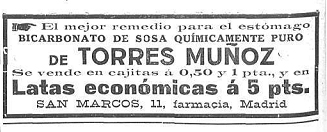 Anuncio del bicarbonato de soda Torres Muñoz, en la revista Mundo Gráfico.